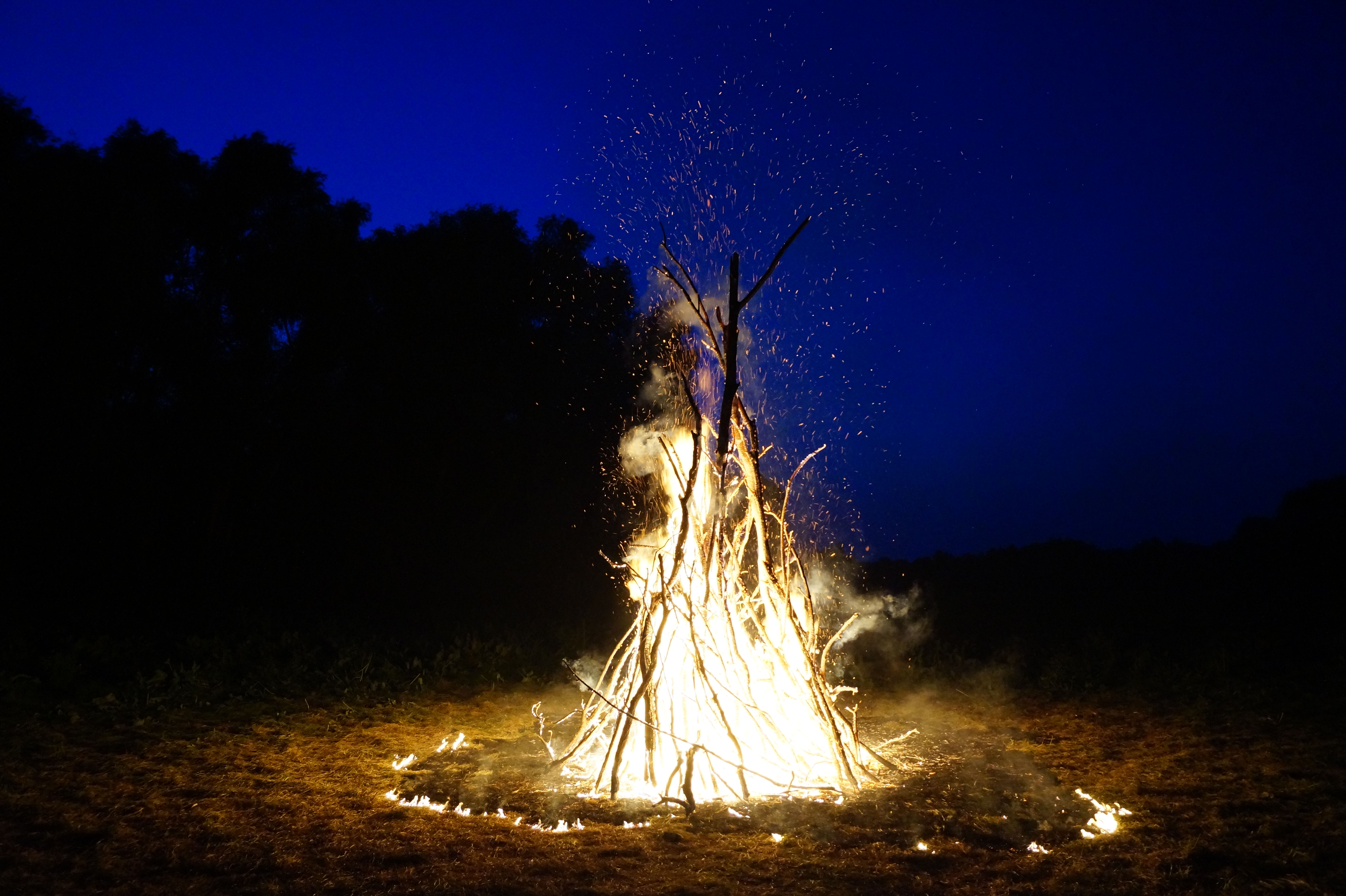 Пионерский костер